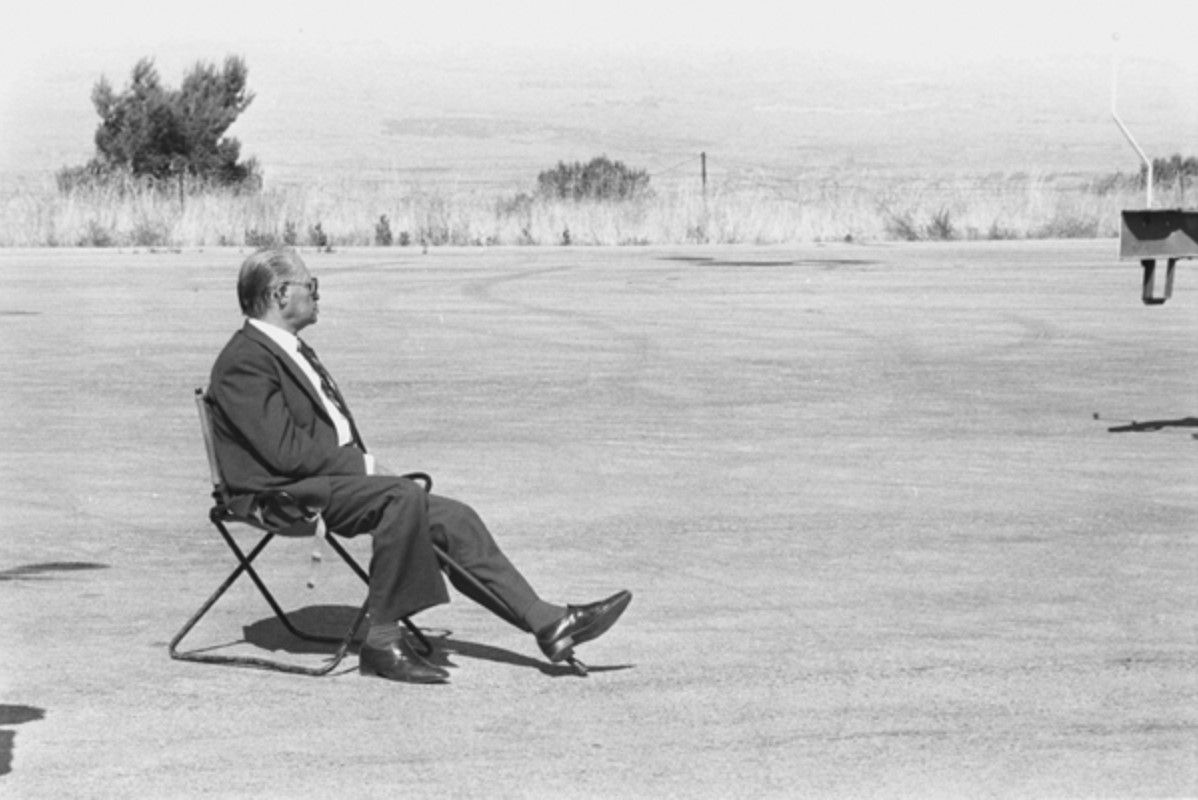 מלחמת שלום הגליל: בדד – ראש הממשלה מנחם בגין.